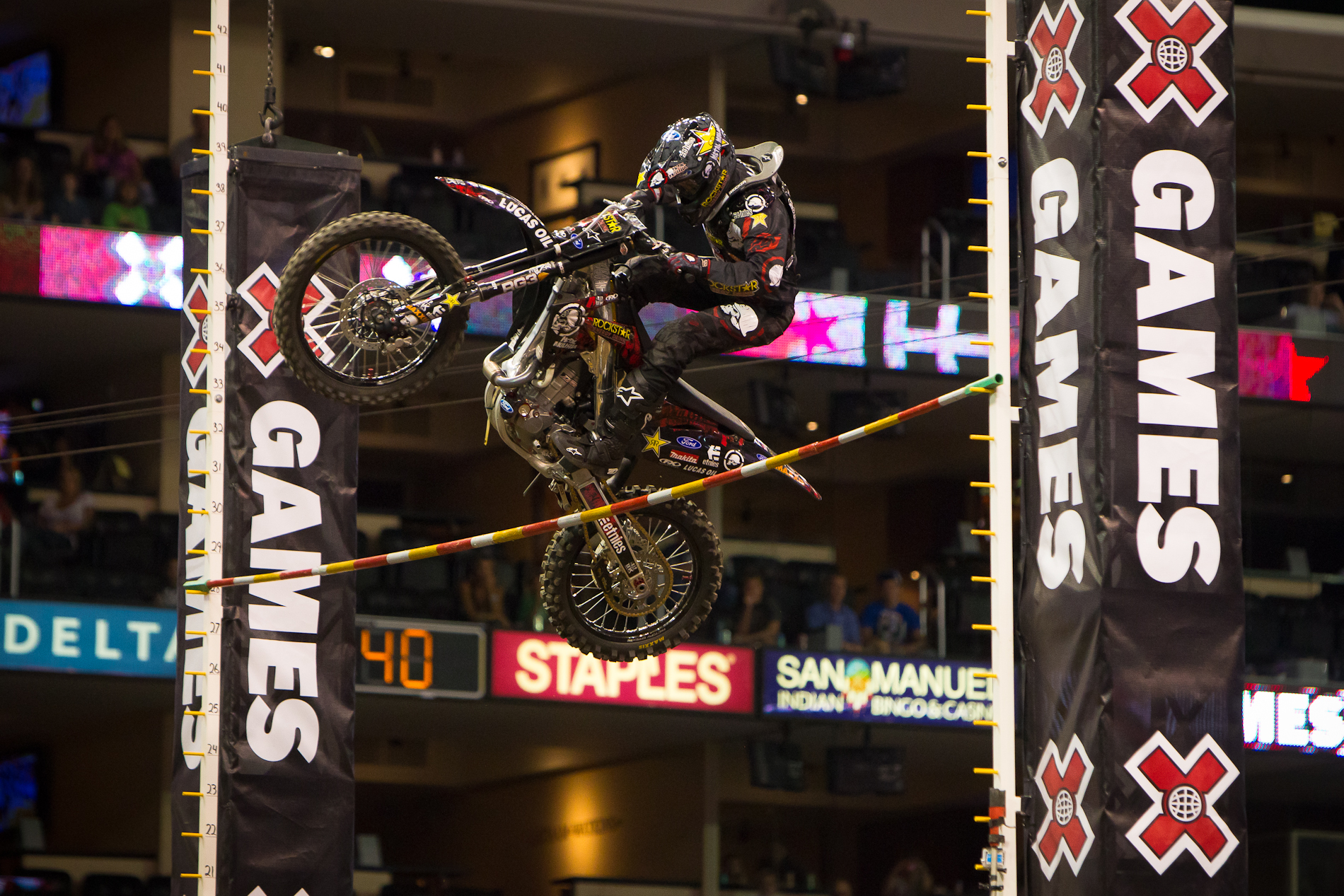 Brian Deegan. X Games 17. Los Angeles